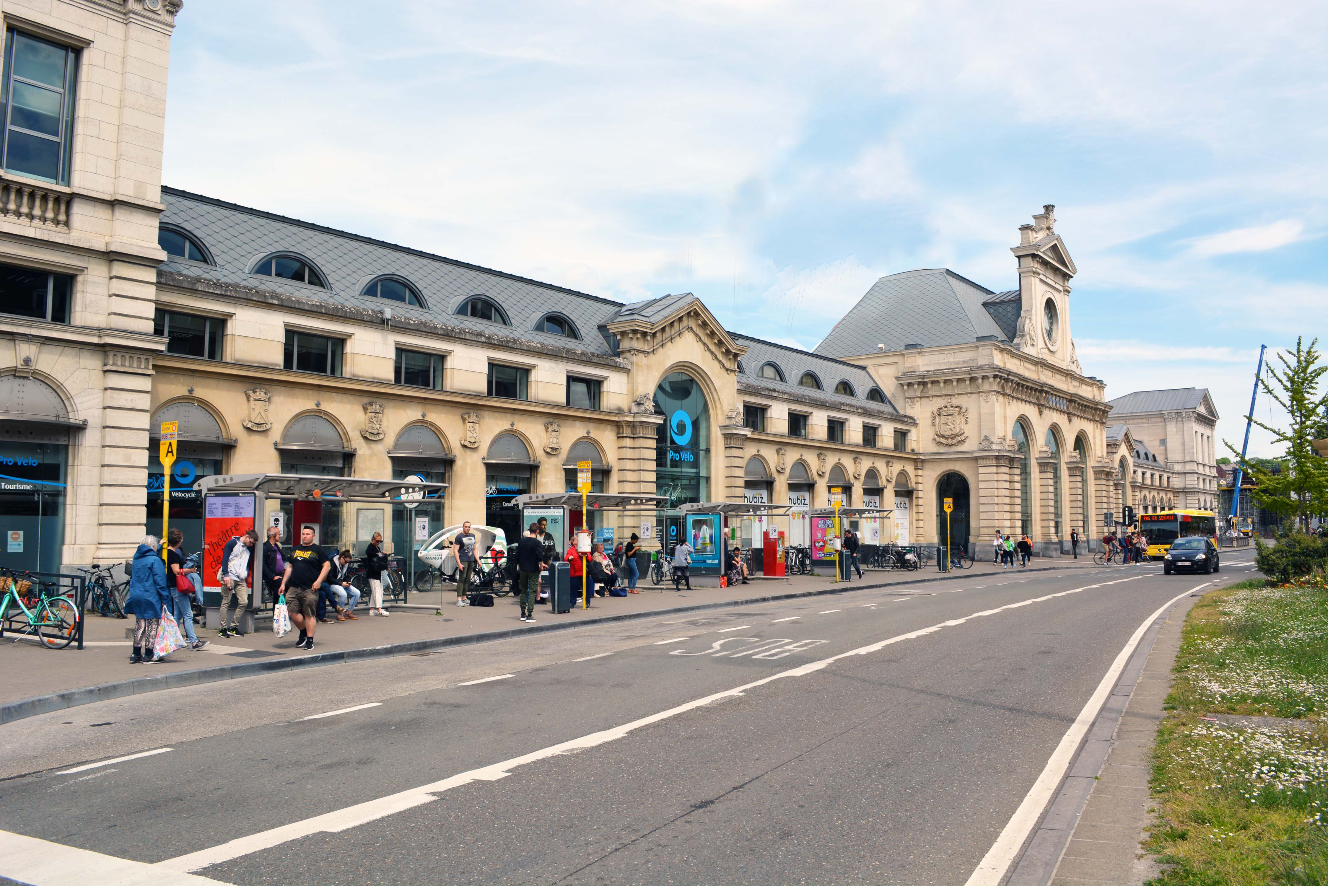 Gare de Namur - 2019